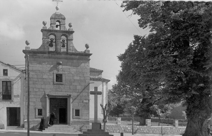 Ermita del Cristo de Gracia - Las Navas del Marqués (Ávila) - Ediciones García Garrabella. Zaragoza. Texto en reverso - Postal 150 x 100 B/N